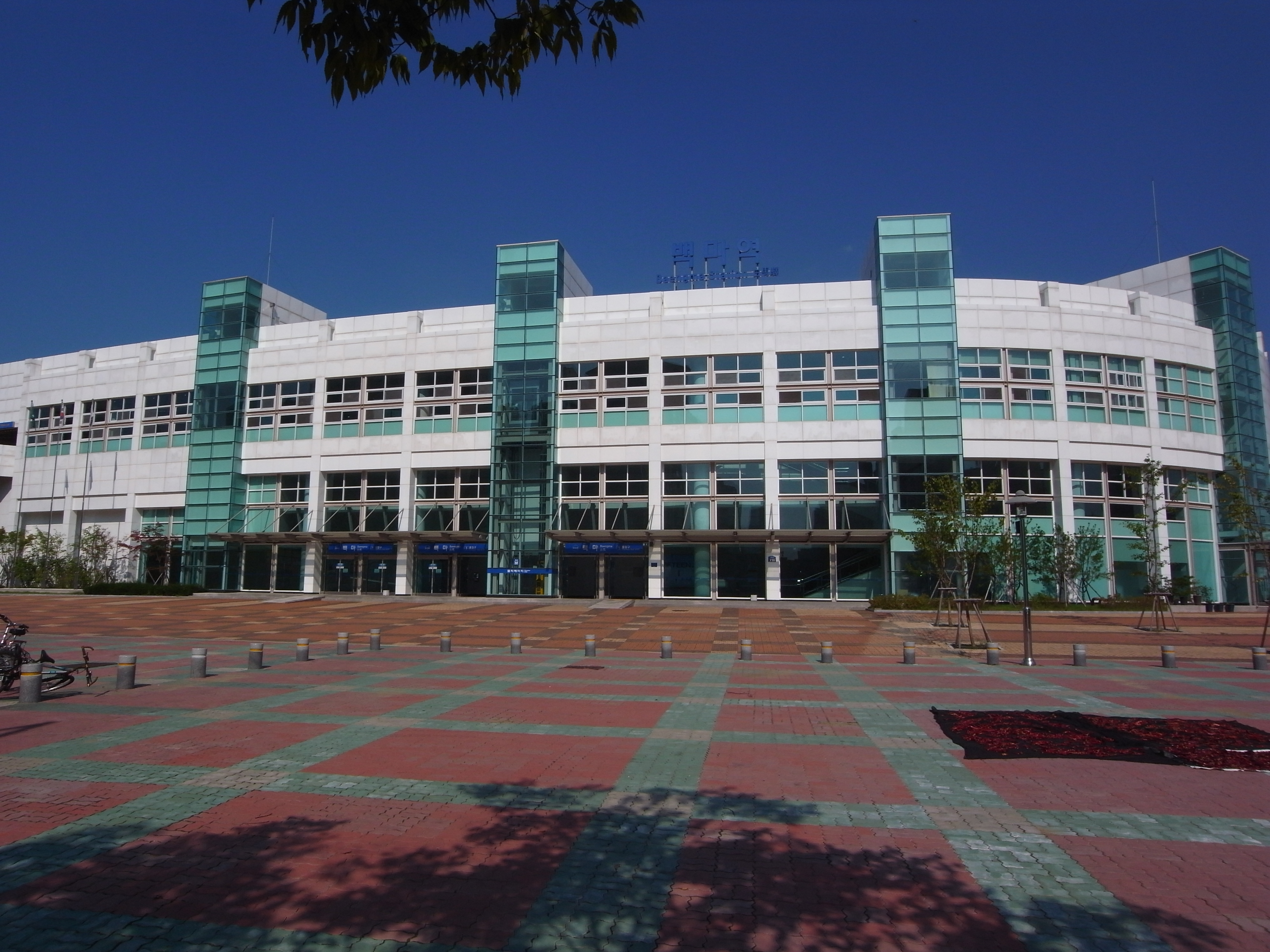 경의선 백마역